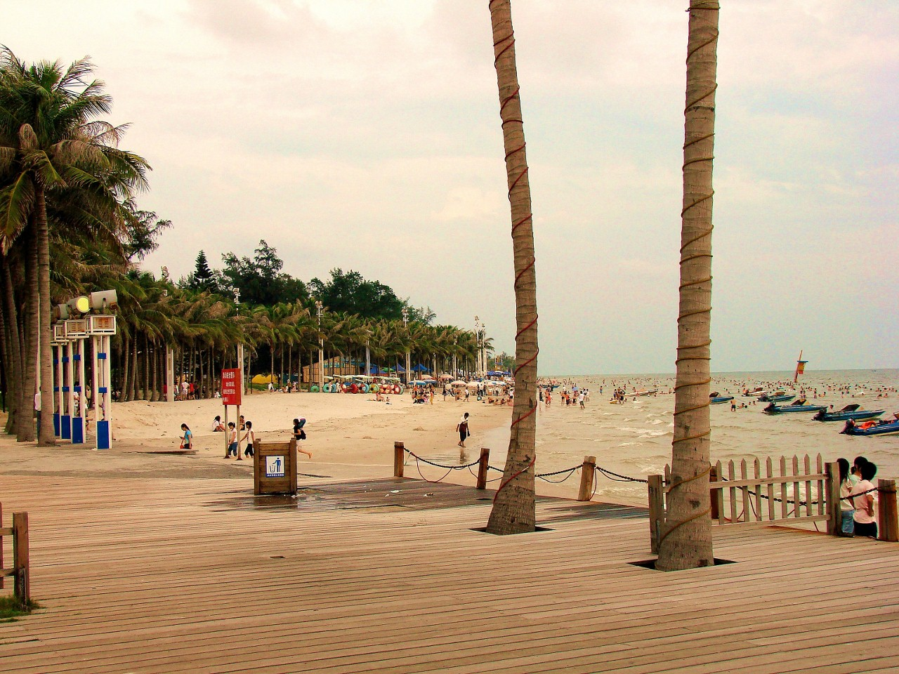 Beihai Silver Beach (Guangxi, China)